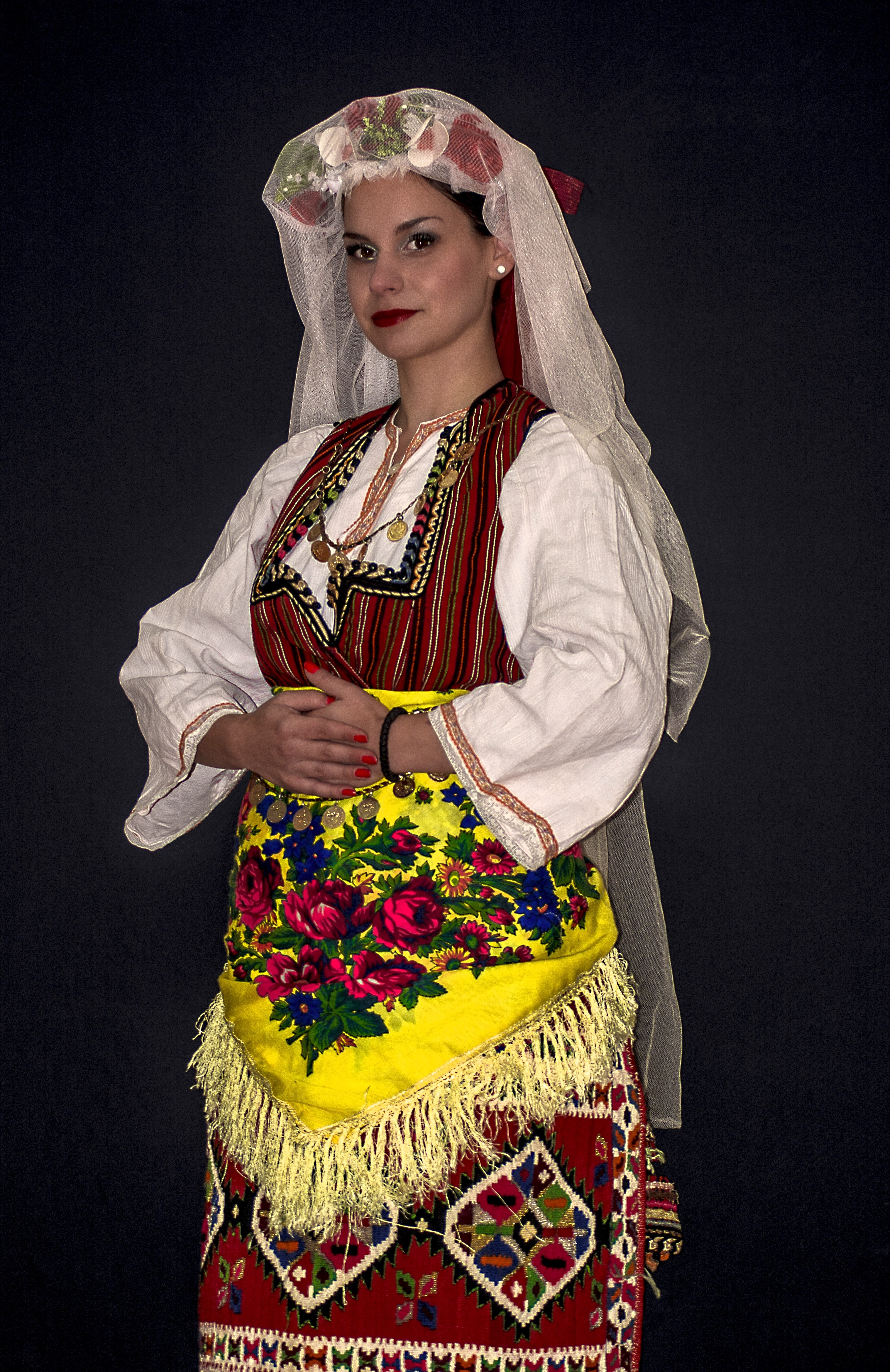 Народна носија од Скопска Црна Гора - c. Раштак (невеста) со кренат фес (детали)